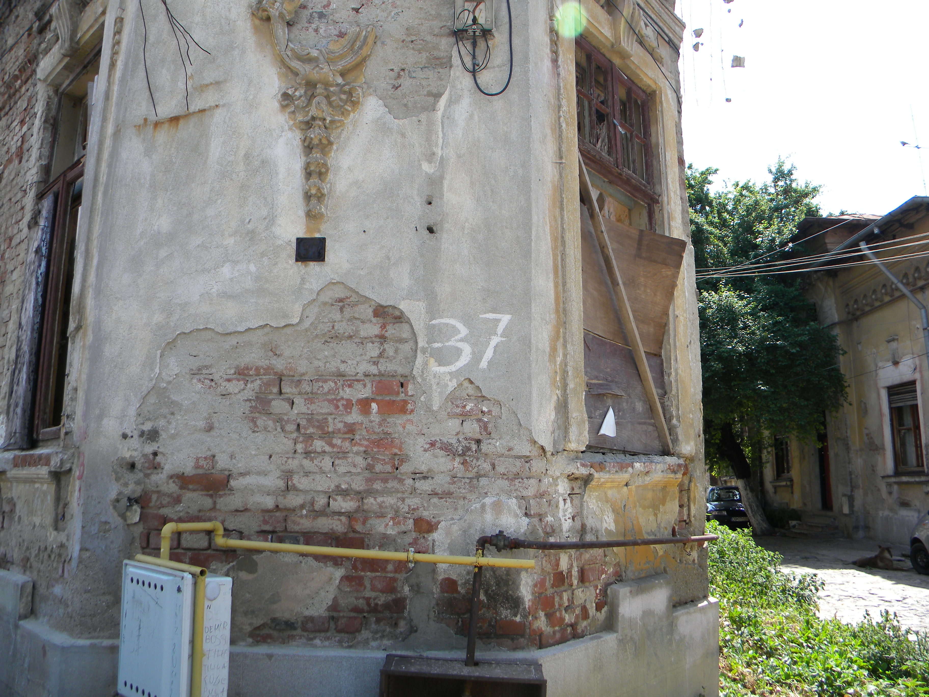 Bucuresti,Romania, Casa pe Str. Parfumului nr. 37; B-II-m-B-19344 (detaliu 2)